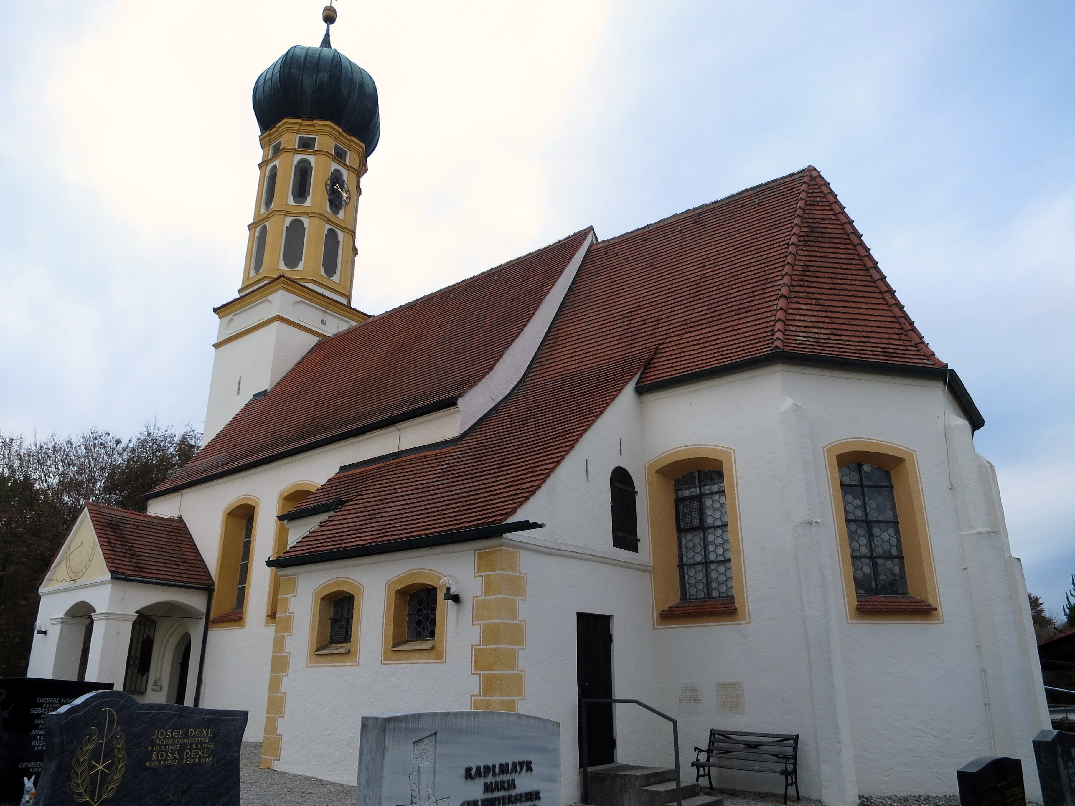 Ansicht der Kirche von der Chorseite